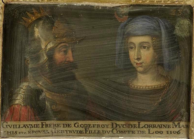 Portrait de Guillaume, duc fictif de Lorraine, et de son épouse Gertrude de Loo. Ce tableau fait partie d'une suite d'une soixantaine de double-portraits représentant les ducs et duchesses de Lorraine ainsi que leurs ancêtres supposés.